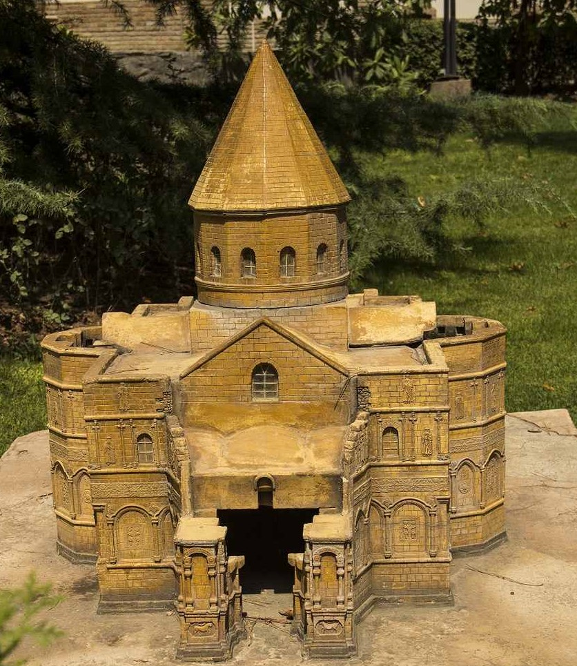 The model of St. Thaddeus Monastery